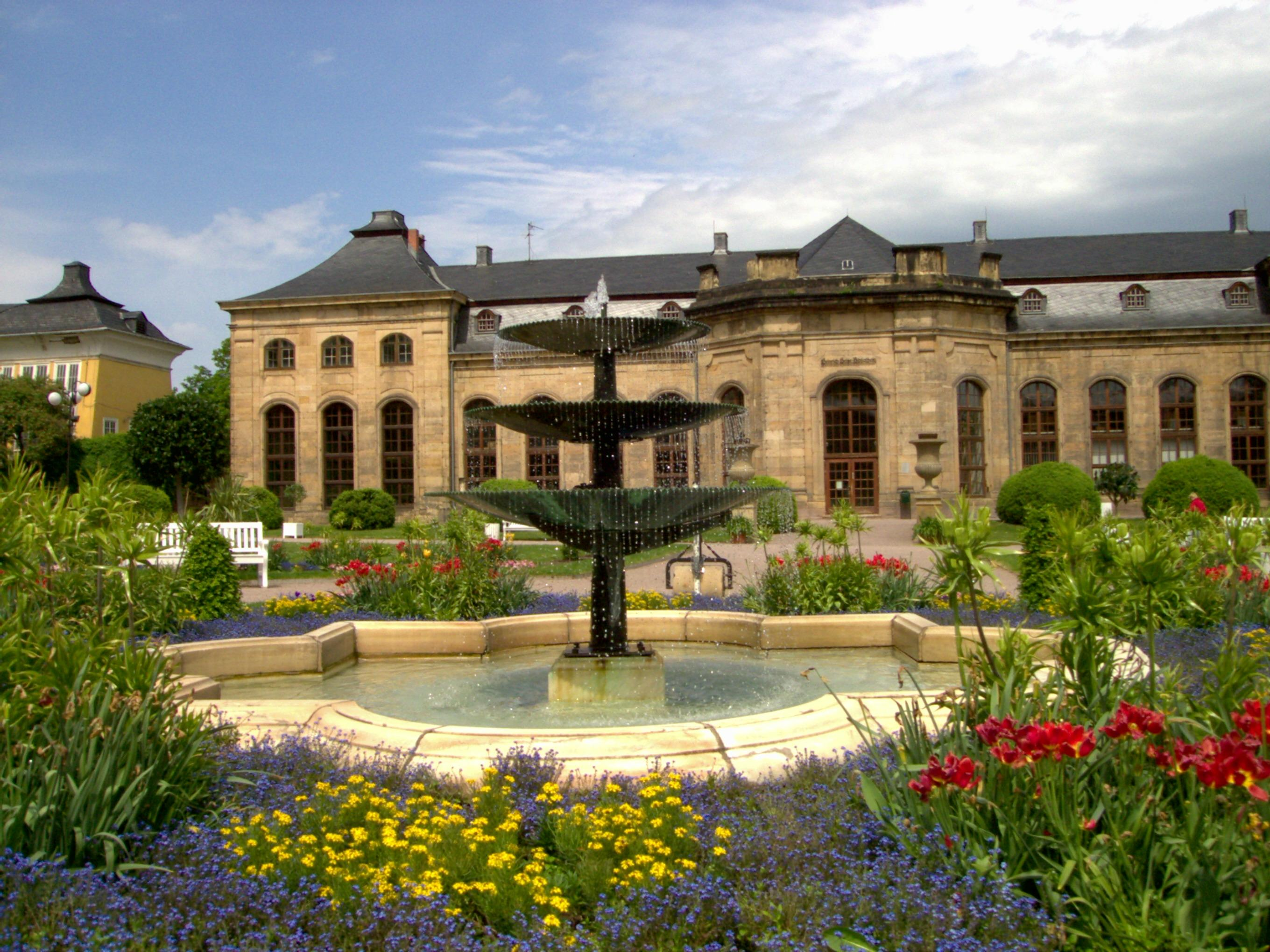 Orangerie im Gothaer Schlosspark